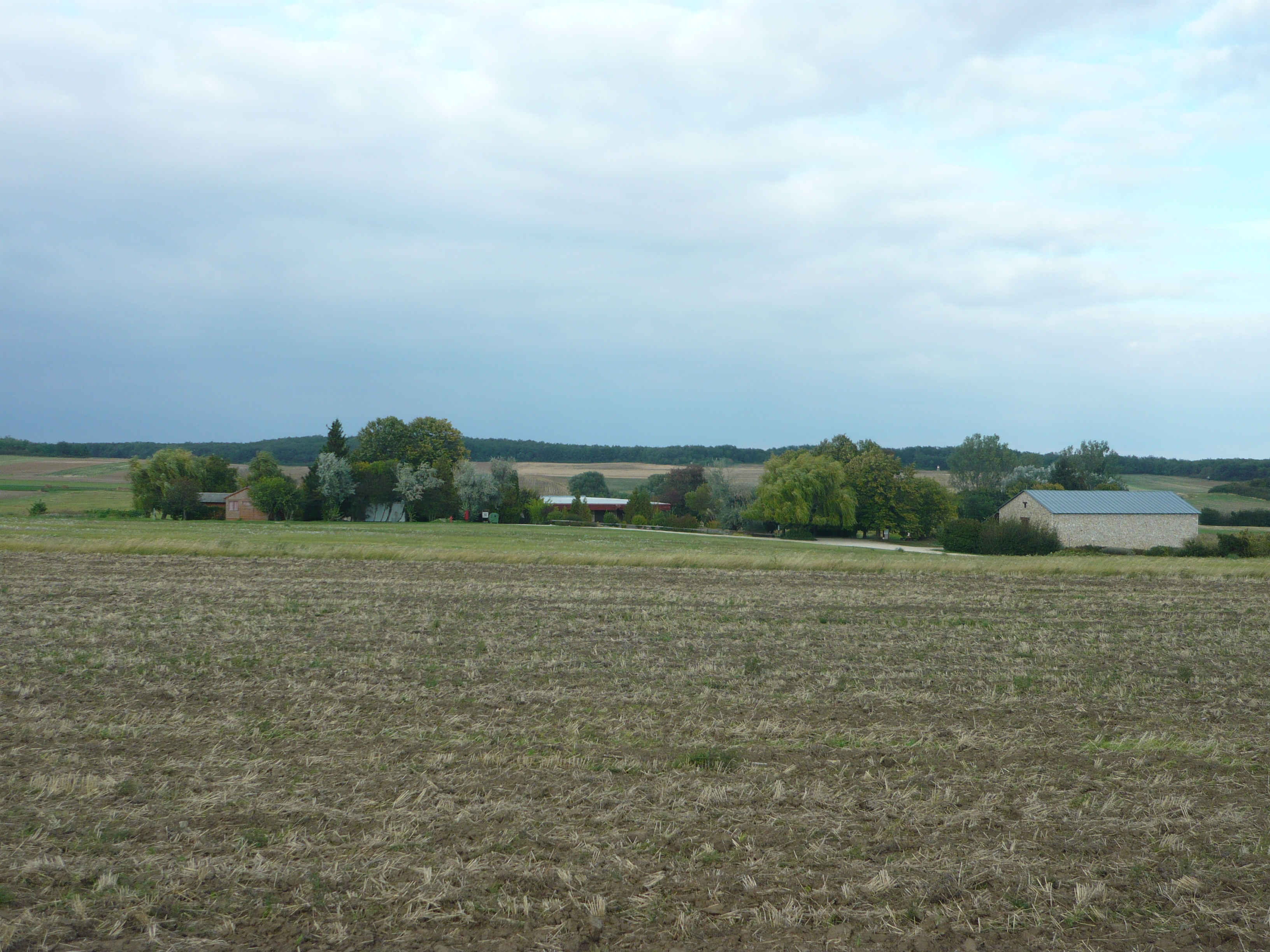 római villagazdaság, likasdombi halomsír This is a photo of a monument in Hungary. Identifier: 15525